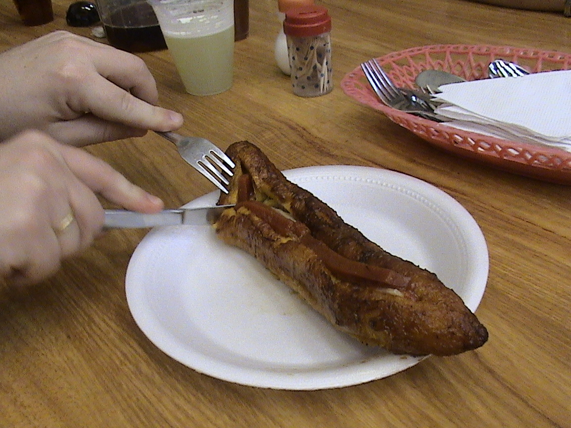 Bananas